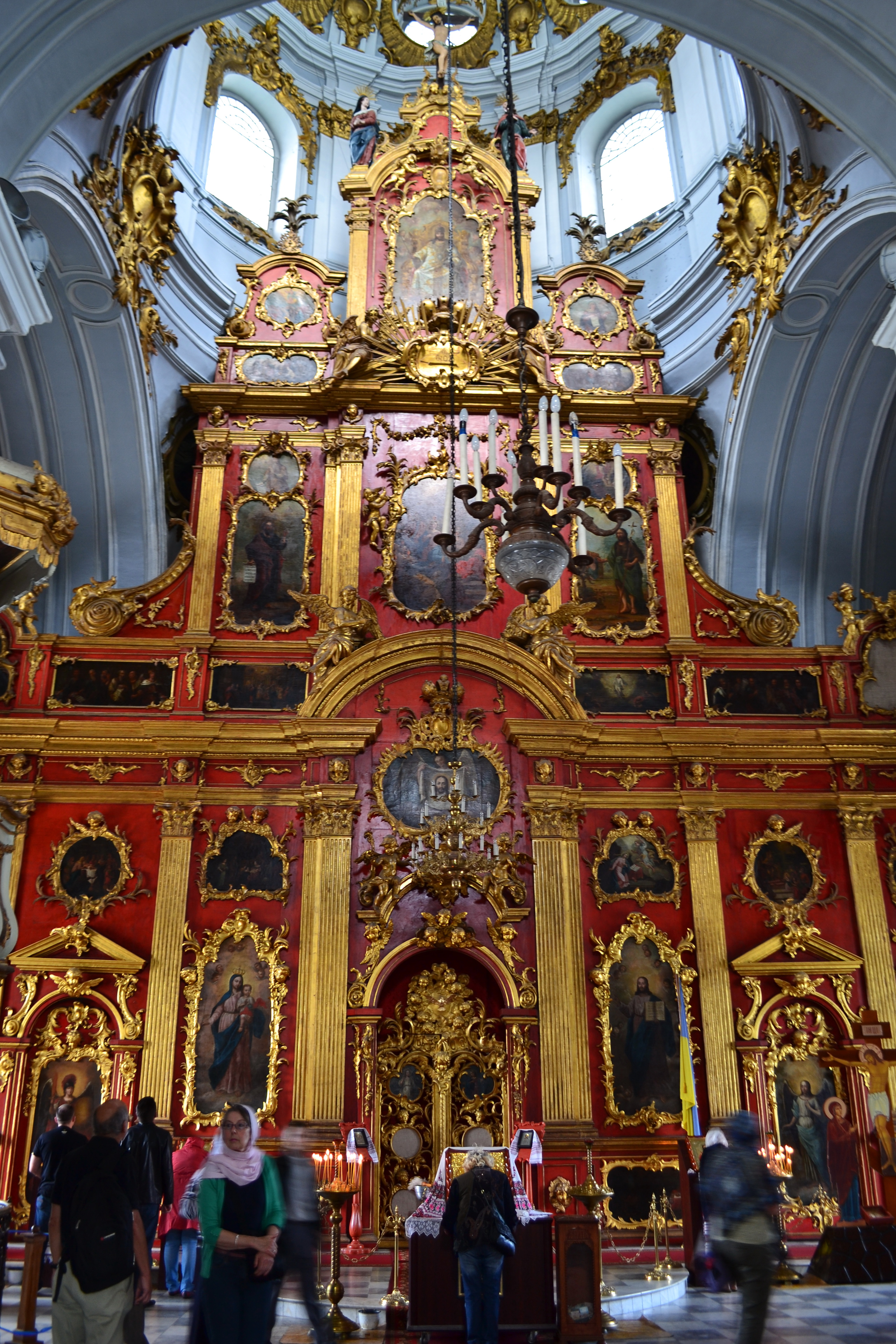 Алтарь Андреевской церкви